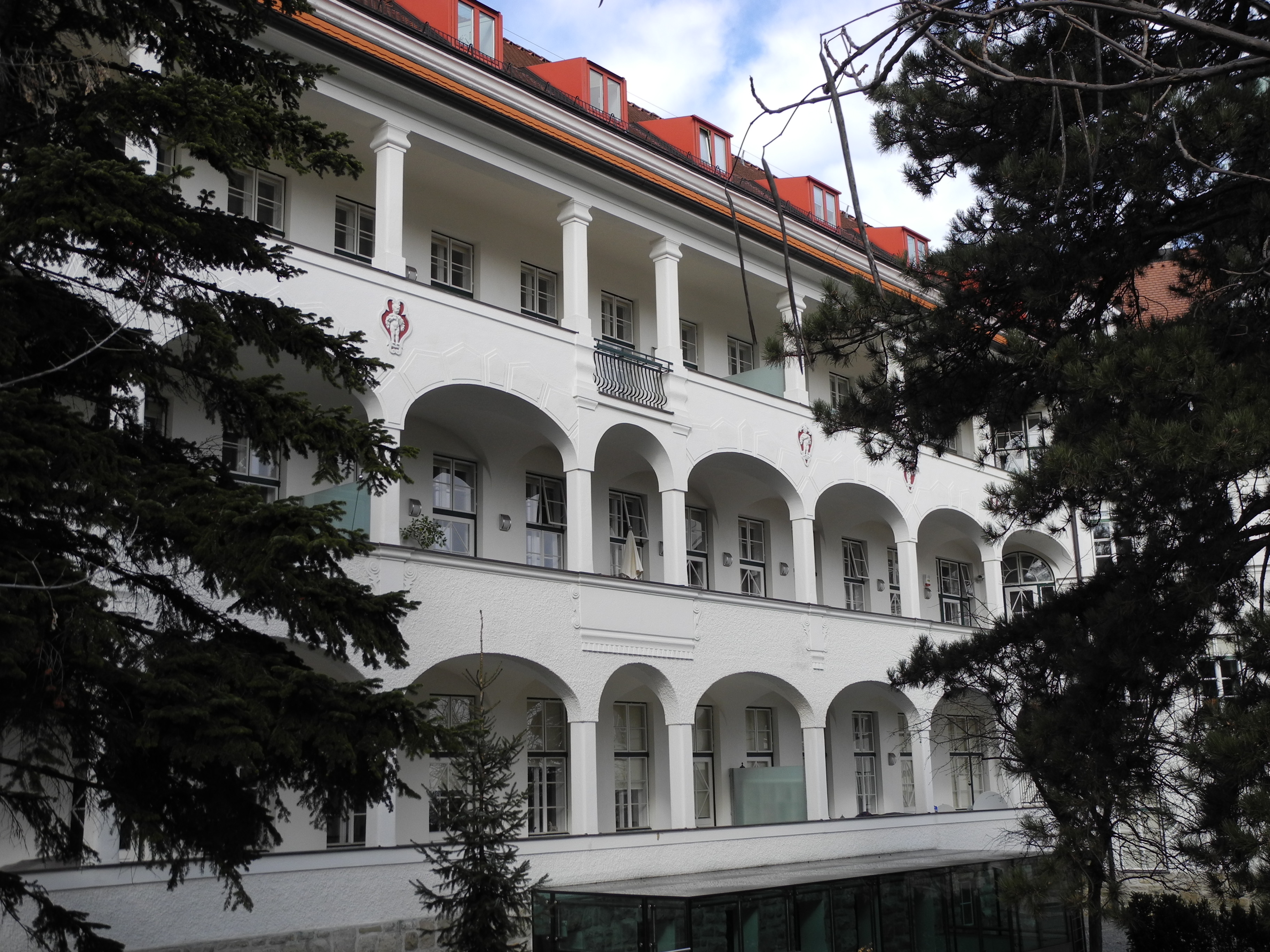 Ehem. Kinderklinik Glanzing